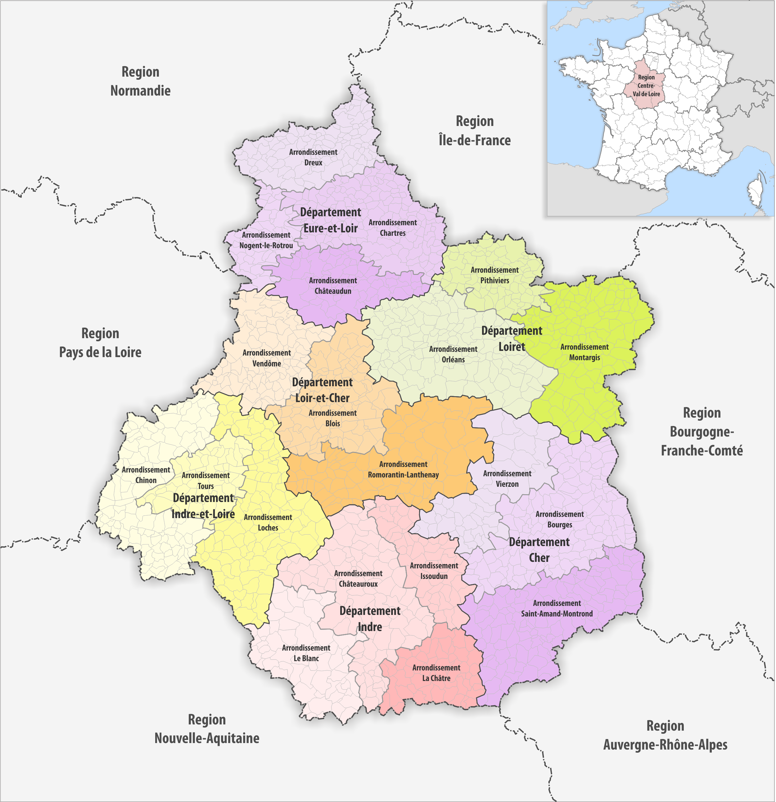 Gemeinden, Arrondissemente und Departemente in der Region Centre-Val de Loire